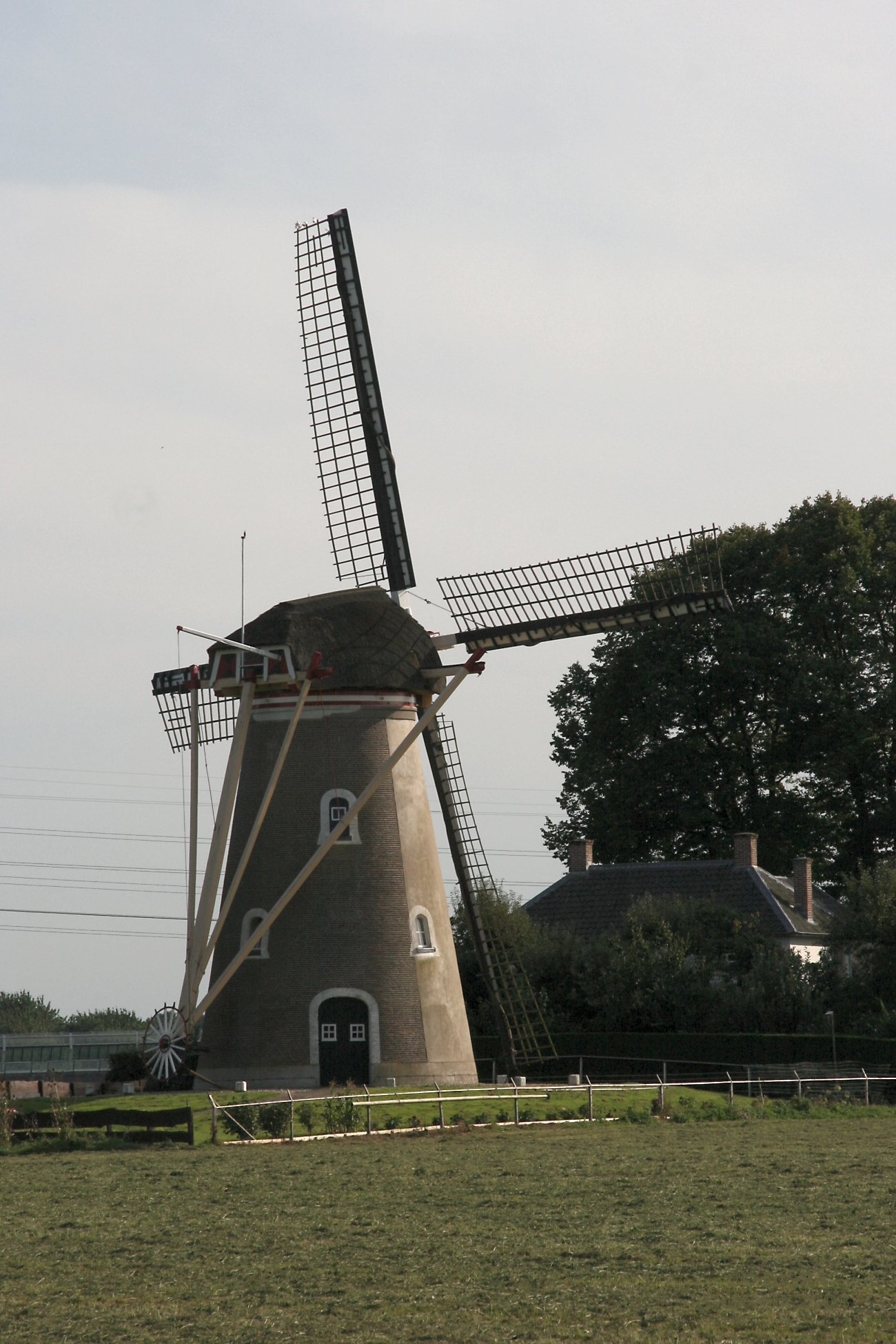 Zoelen: molen De Korenbloem